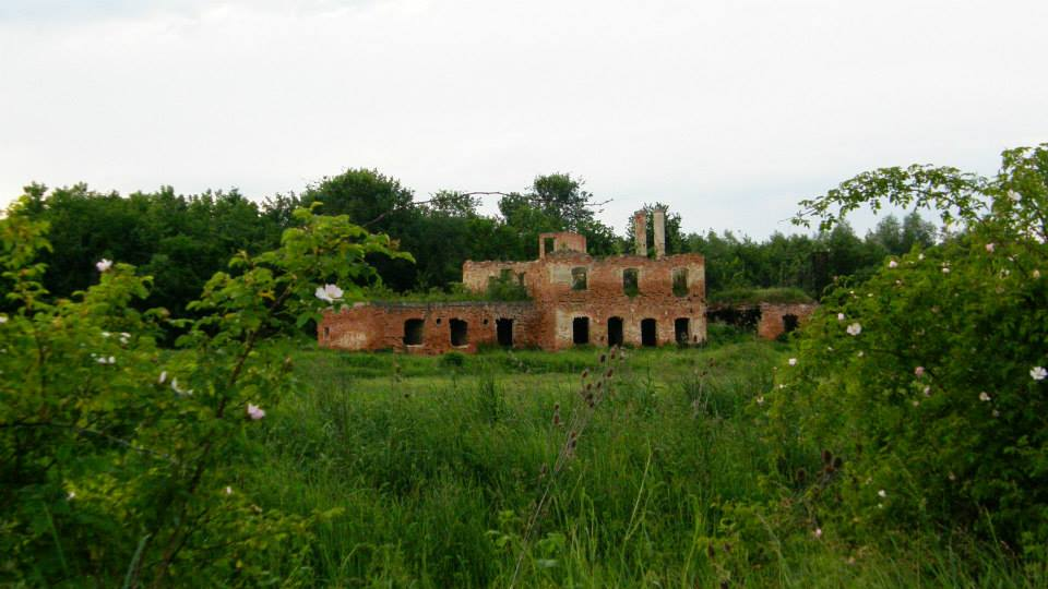 A tábi kastély maradványai